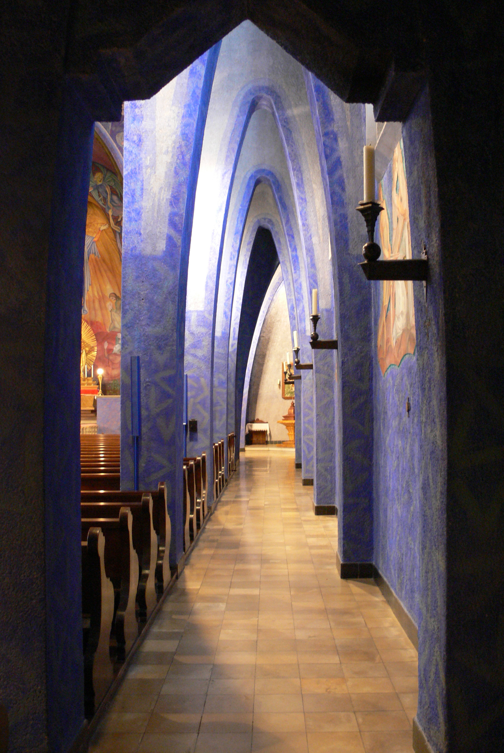 Baienfurt, Landkreis Ravensburg Katholische Pfarrkirche Mariä Himmelfahrt Seitenschiff mit Parabelbögen